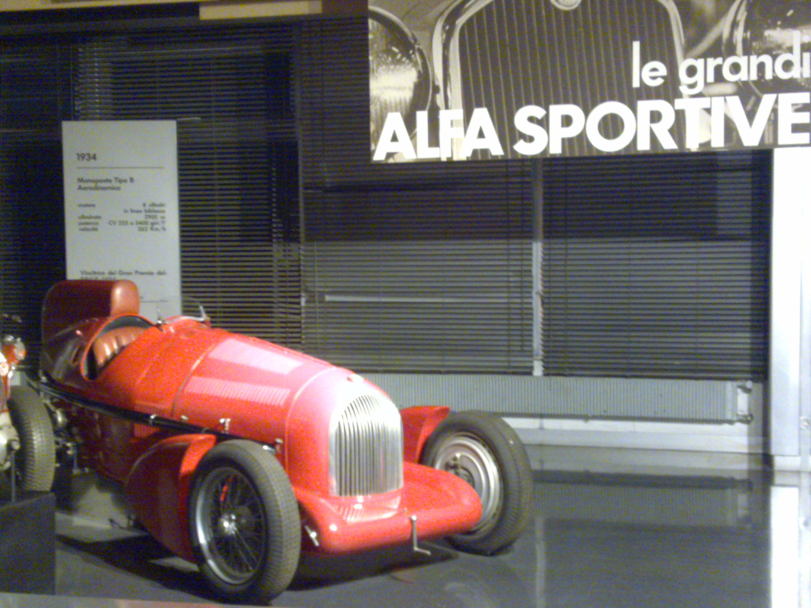 1934 Alfa Romeo monoposto Tipo B Aerodinamica